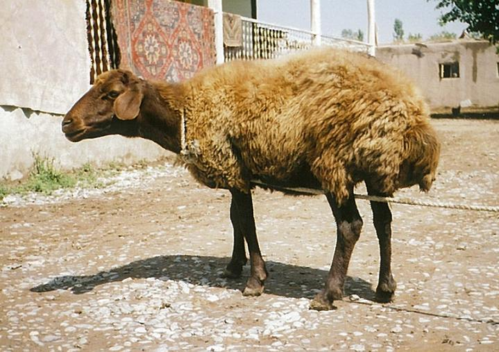 Iğdır sheep